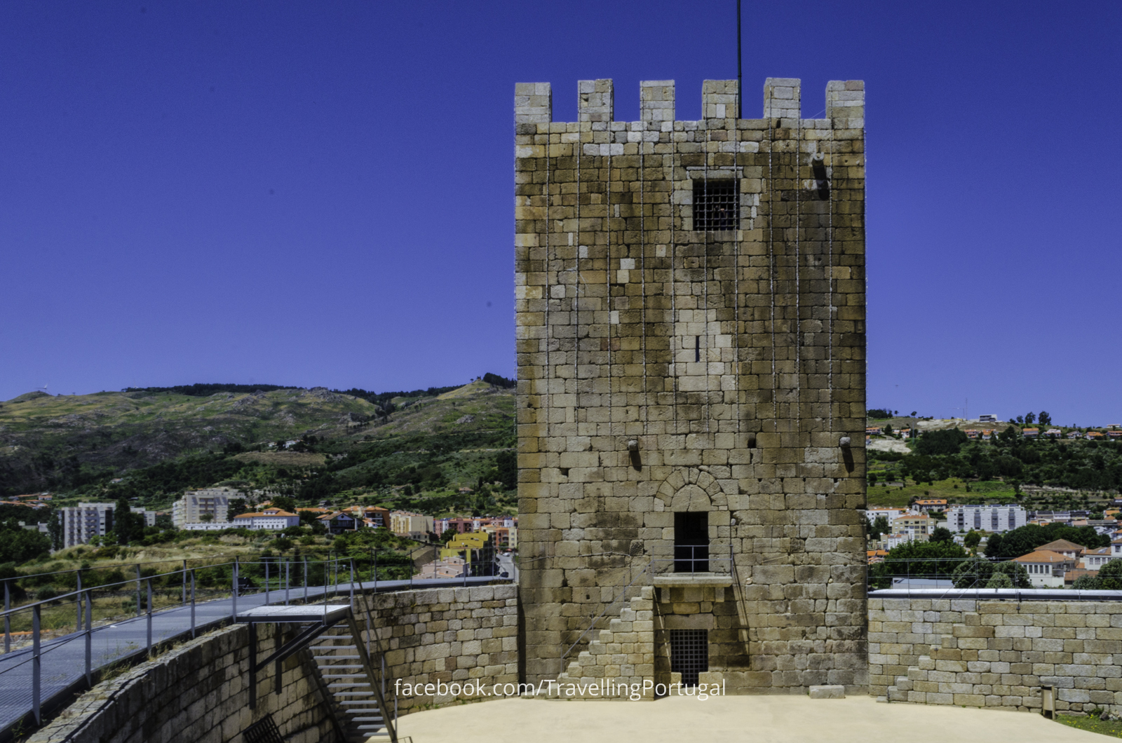 Lamego_castle